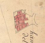 Vallcrosa del Mig en el Cadastre napoleònic del 1812 (Arxius Departamentals dels Pirineus Orientals)